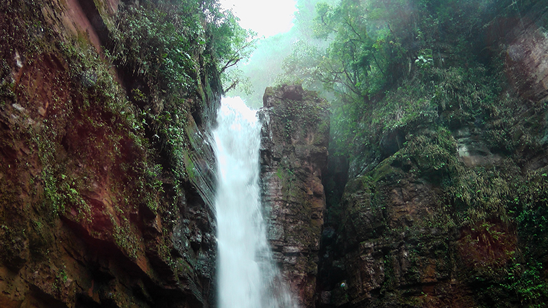 Inicio de la Catarata EL PAREDÓN